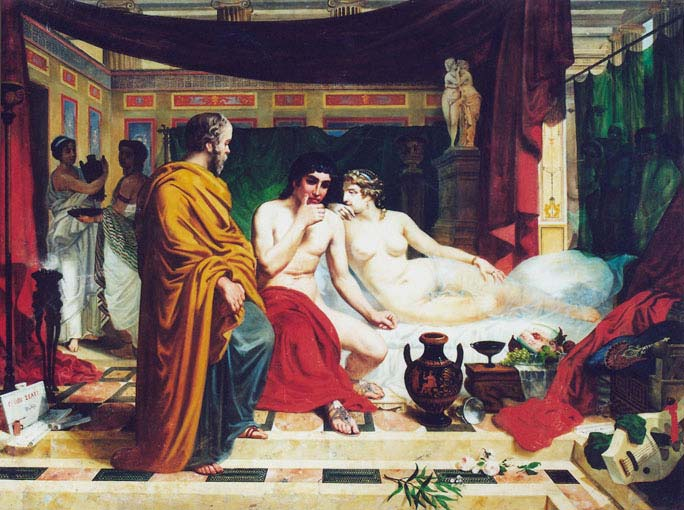 Sócrates afastando Alcebíades do vício, óleo/tela, 98,0 x 123,0 cm. Prova de Concurso de Magistério para a AIBA.